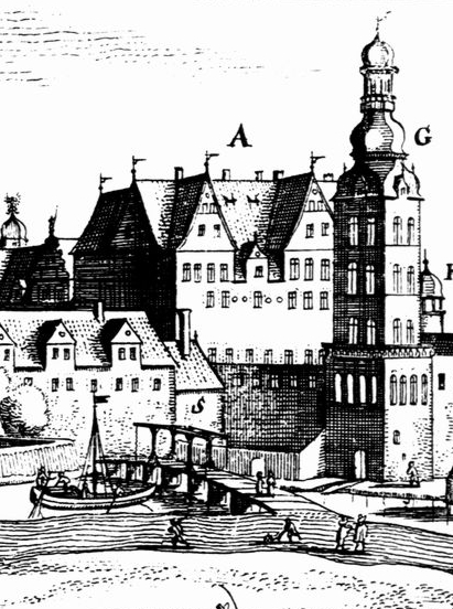 Ansicht der ehemaligen Hundebrück in Berlin. Detail aus Stadtansicht von 1652.